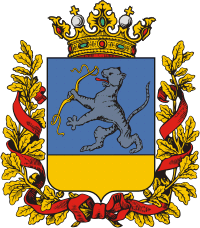 Герб Закаспийской области